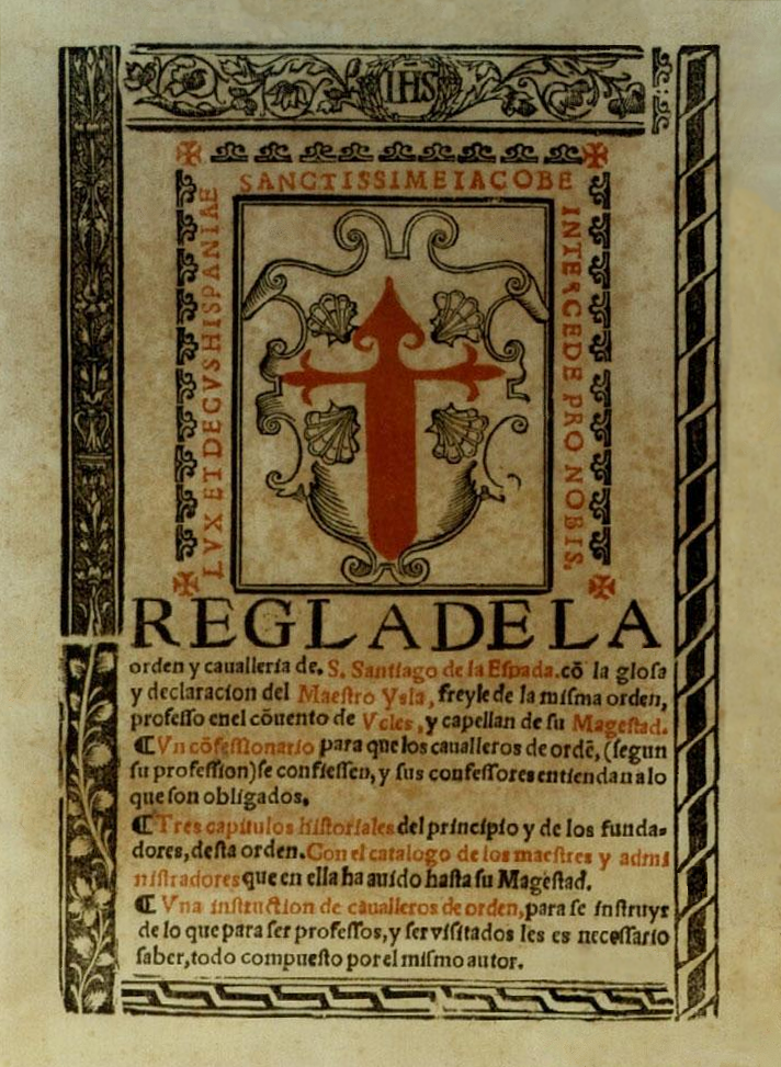 Portada del libro titulado "Regla de la orden y cavalleria de S. Santiago de la Espada / co(n) la glosa y declaracion del Maestro Ysla". Publicado en Alcalá de Henares, en 1547, por el impresor Juan Brocar.